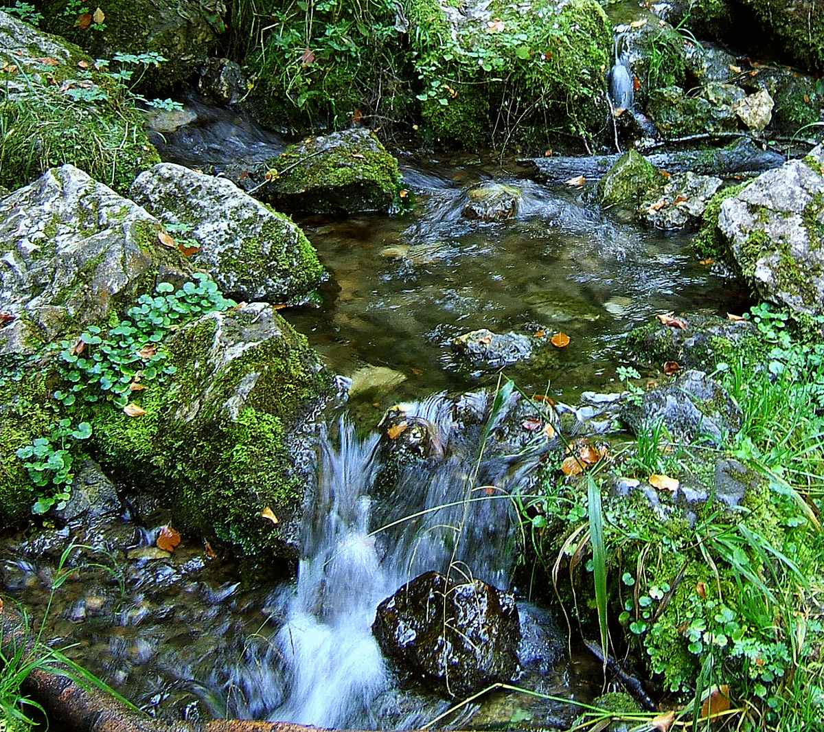 Karstquelle des Brühlbachs, der wenige Meter entfernt den in Baden-Württemberg, Deutschland, gelegenen Uracher Wasserfall bildet.